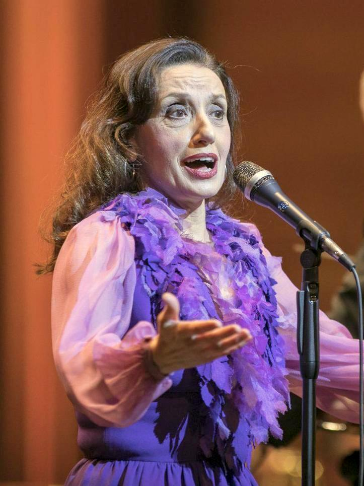 Luz Casal y la Banda Sinfónica Municipal de Madrid, bajo la dirección del maestro Rafael Espert, han sido los protagonistas del tradicional concierto Benéfico de organizado por el Área de Cultura y Deportes dentro de su programación navideña, que en la mañana de hoy, viernes 5 de enero, ha llenado el Teatro Real.